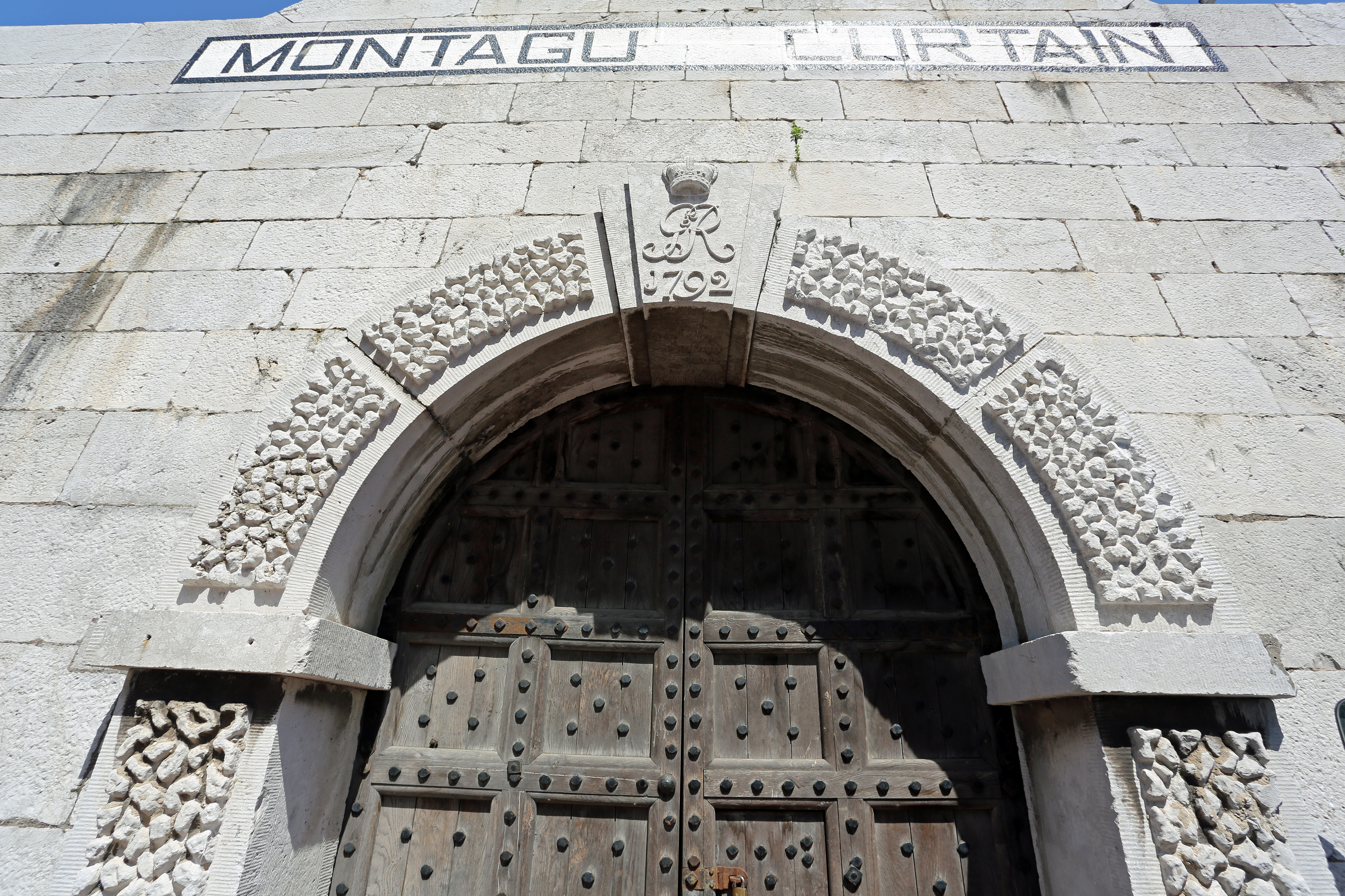 Montagu Gate, Montagu Curtain, Gibraltar